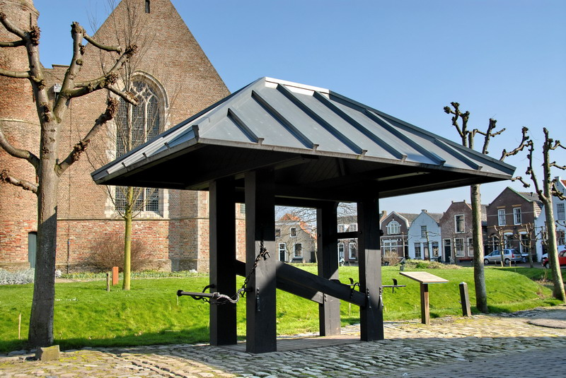 Travalje/Hoefstal in Dreischor, Rijksmonument (nummer:11171)